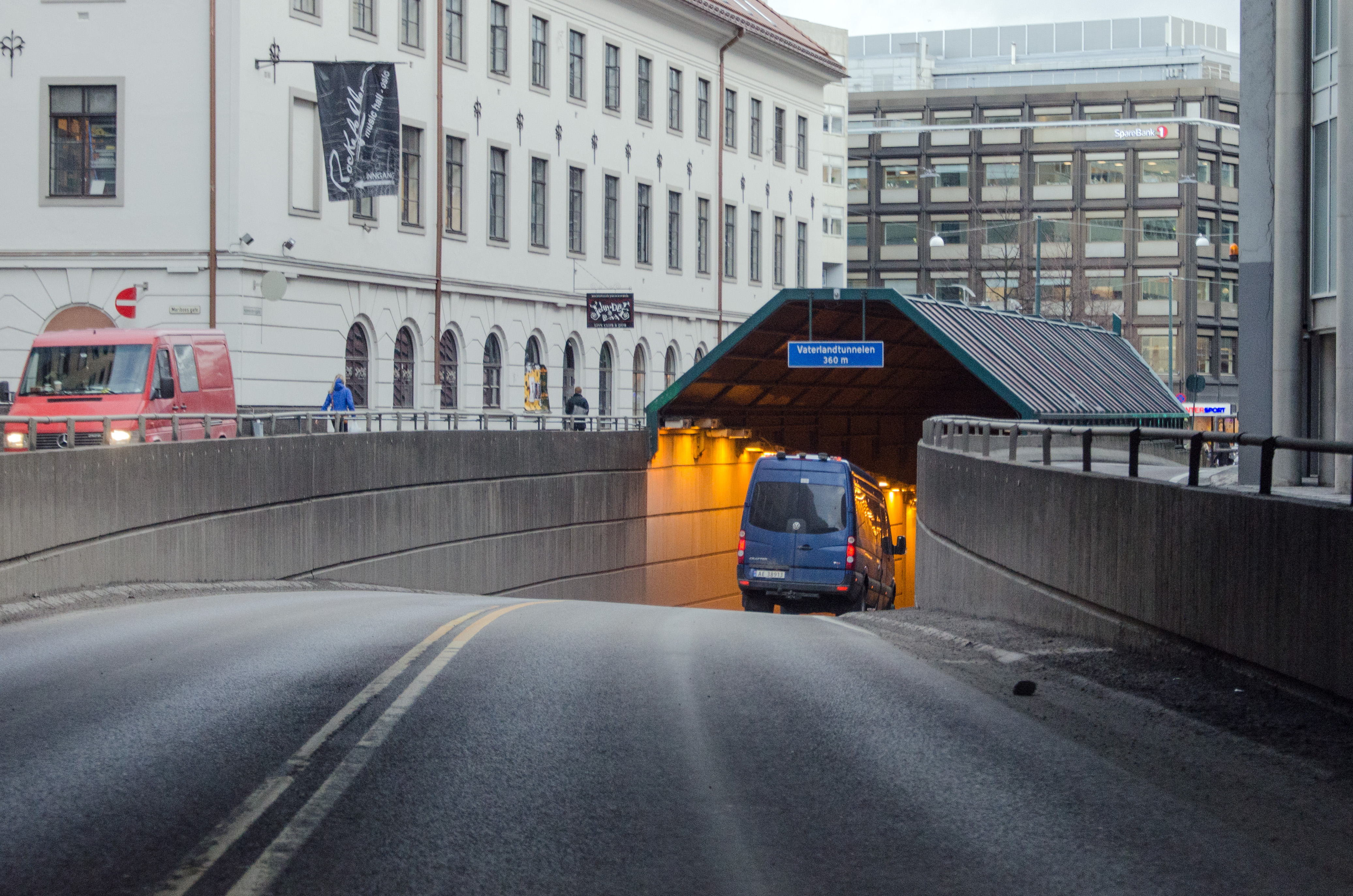 Vaterlandstunnelen